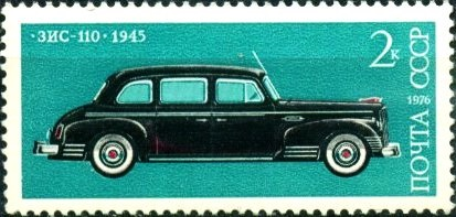 Почтовая марка СССР. 1976. История отечественного автомобилестроения. ЗИС-110. Номер в каталоге ЦФА 4578